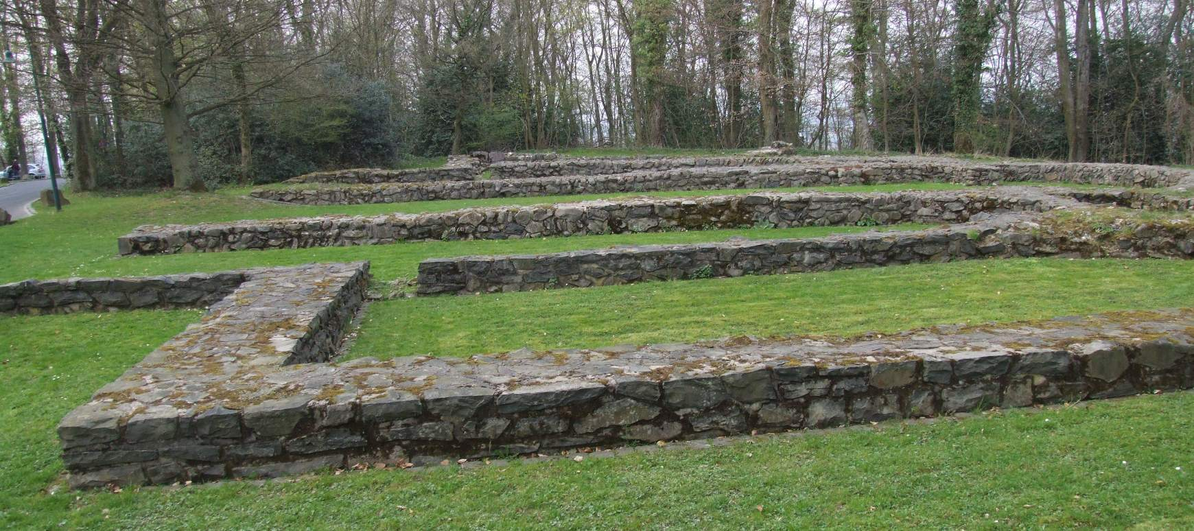 Reste der fünfschiffigen mittelalterlichen Kirche auf dem Petersberg in Königswinter